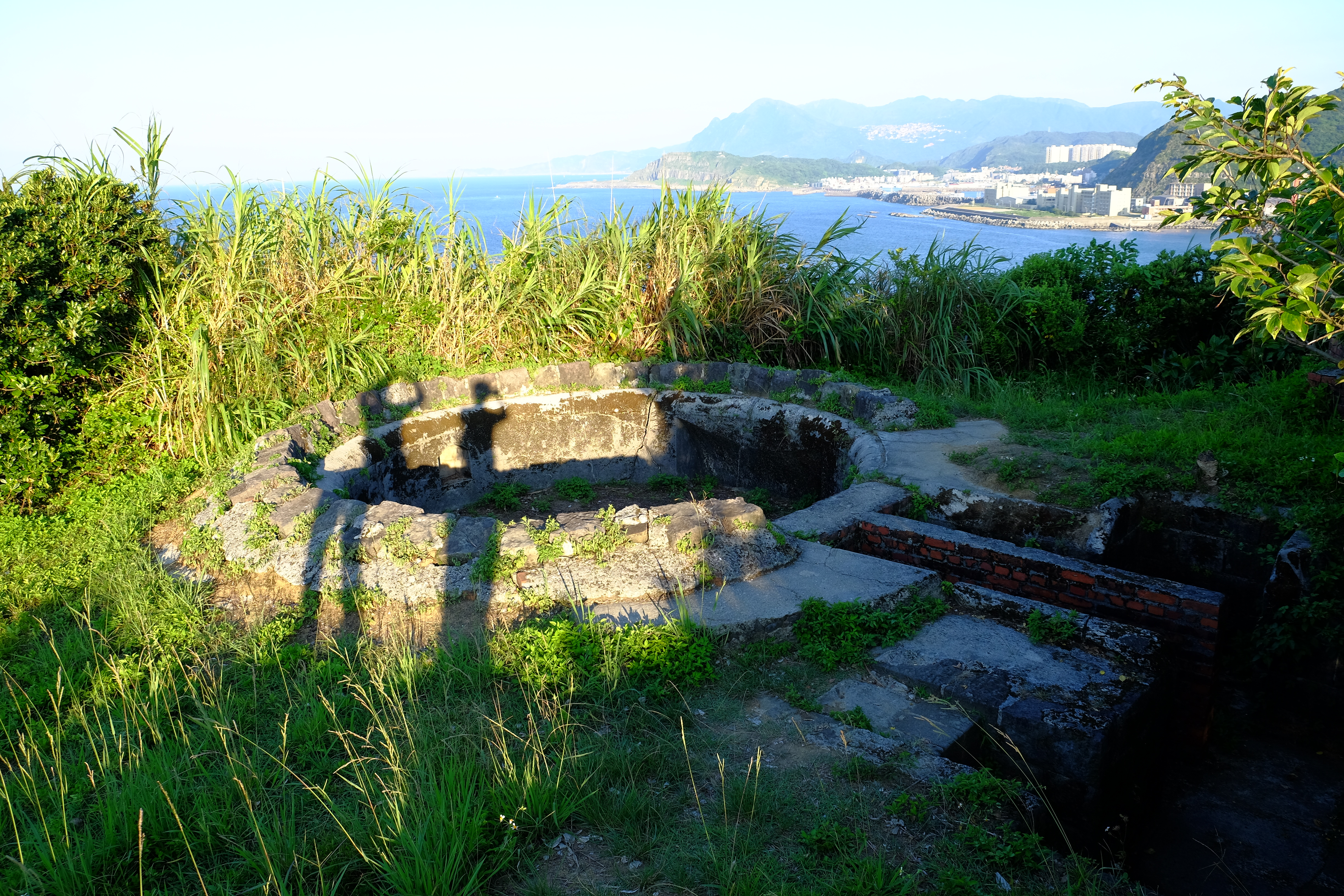 社寮東砲台